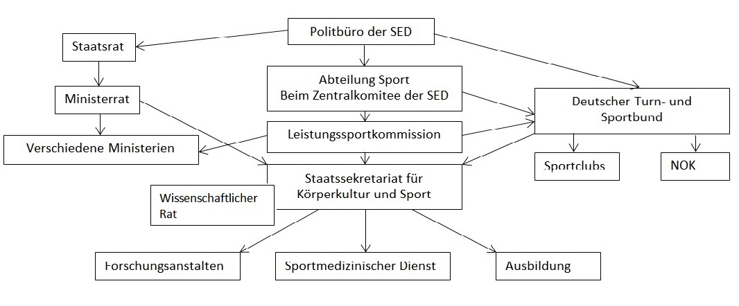 Deitsch: Organigramm des DDR Leistungssport - vereinfachte Form - in Anlehnung an Karlheinz Giesler: Darstellung des Leistungssystems im DDR-Leistungssport, In: Sportwissenschaften, 13 , 1983